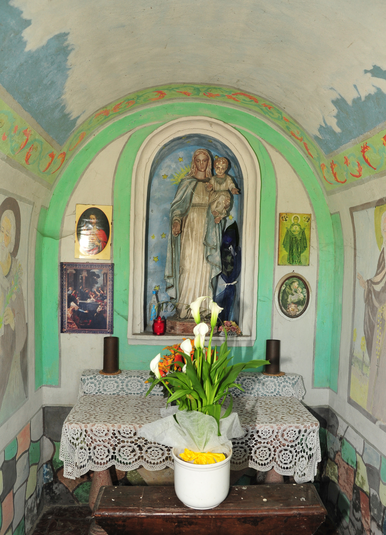 Loc Felina4